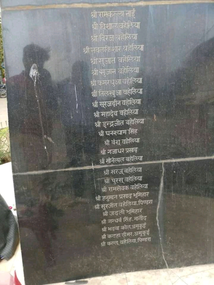 बहेलिया